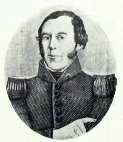 Pedro Nolasco Vidal Gómez (n. Santiago; 31 de enero de 1790 - f. Valparaíso; 30 de abril de 1856) fue un político chileno. Hijo de Manuel Bernardo Vidal de Moa y de Eduvigis Gómez y Jofré de Loayza, estuvo casado con Bernarda Crespo, de origen uruguayo, con quien tuvo varios hijos.